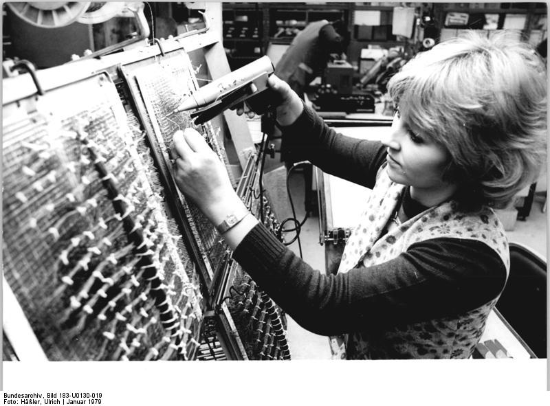 VEB Robotron Elektronik Dresden, Computer EC 2640 ADN-ZB Häßler 30.1.79 Integration-Dresden: Elektronische Datenverarbeitungsanalgen aus dem VEB Robotron-Elektronik gehören zum Eser-Programm der RGW-Länder. Als ein Hauptziel im sozialistischen Wettbewerb haben sich die 86 Kollektive des Betriebs das Ziel gestellt, durch wissenschaftlich-technische Spitzenleistungen bis zum 30. Jahrestag der DDR das Gütezeichen "Q" für eine neue Anlage zu erringen. Auch für Elektromonteur Regine Hahn, hier bei der Restverdrahtung von Paneelen für die Zentraleinheit eines Rechners, Ansporn und Verpflichtung zur weiteren Qualitätsarbeit. Der 100. Rechner vom Typ EC 2640 für die UdSSR soll noch im ersten Halbjahr ausgeliefert werden.